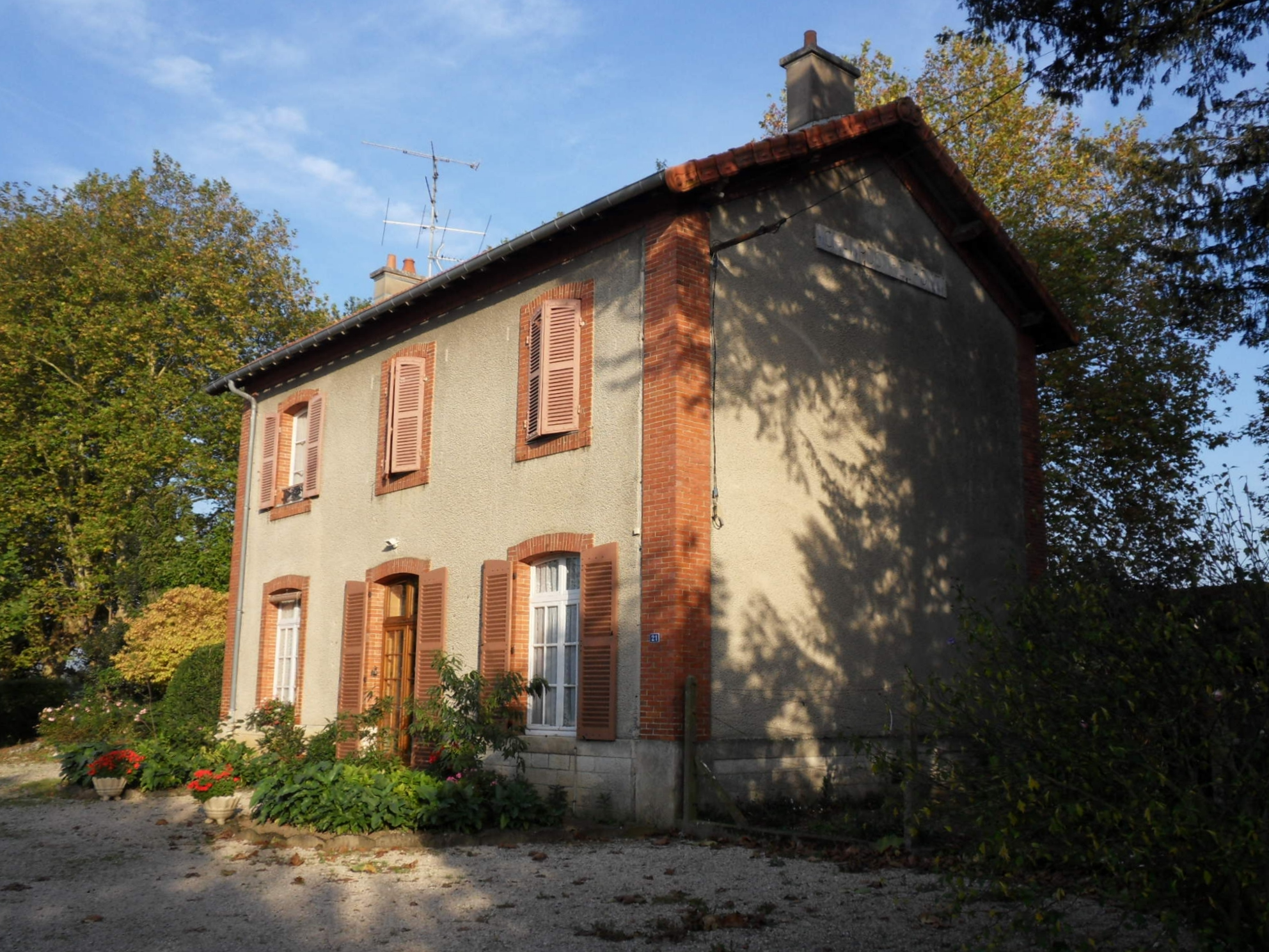 Gare de Champdôtre-Pont. L'ancien bâtiment voyageurs. Sur l'ancienne ligne Ligne Gray - Saint-Jean-de-Losne